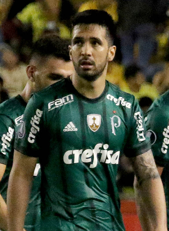 Guayaquil, miércoles 05 de julio del 2017 (Andes).-En el estadio Monumental, Barcelona enfrenta a Palmeiras por los octavos de final de la Copa Libertadores. En la gráfica jugadores del Palmeiras abandonan el campo luego de la derrota. Foto:Andes/César Muñoz